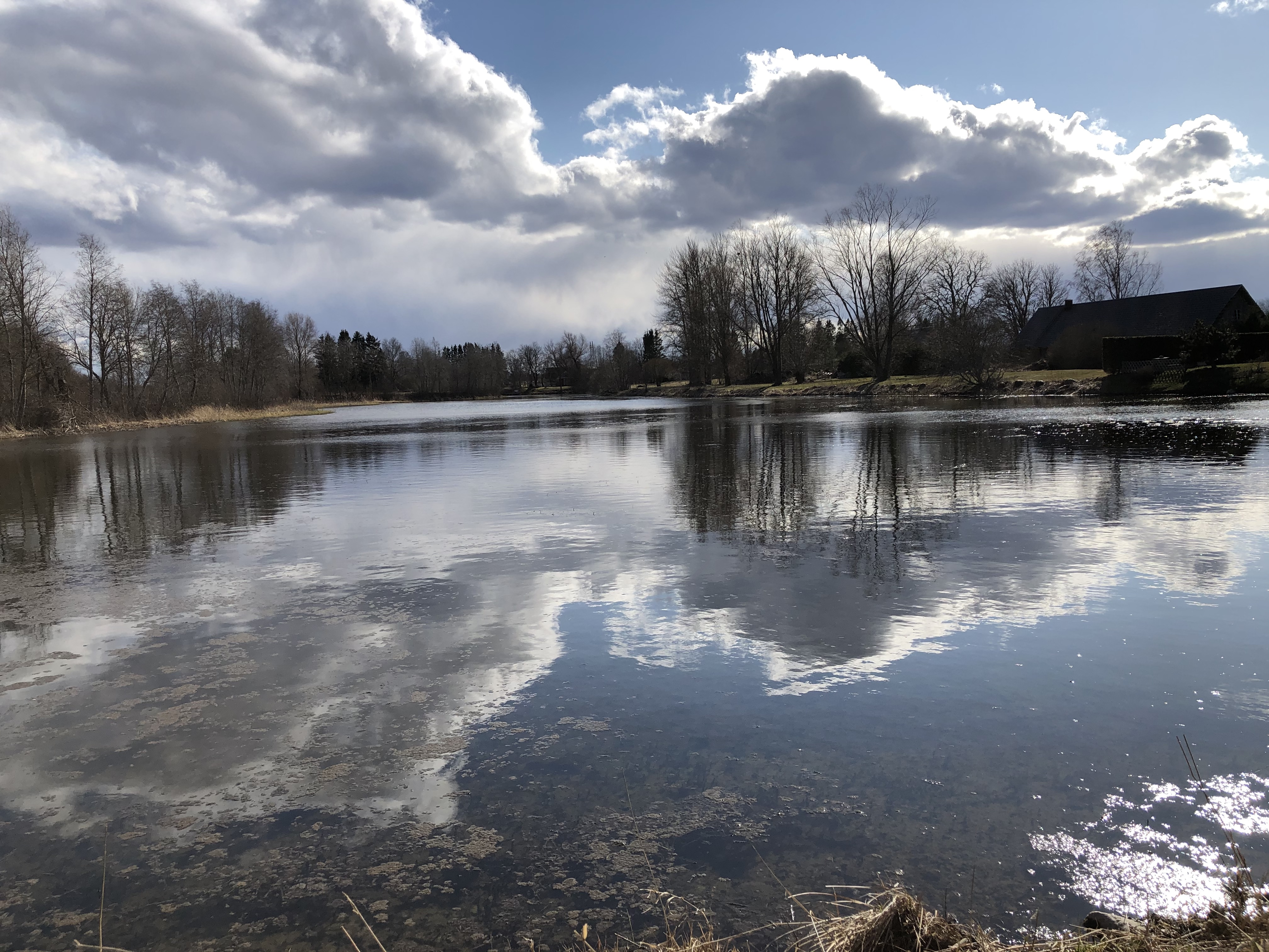 Järv Paeknas